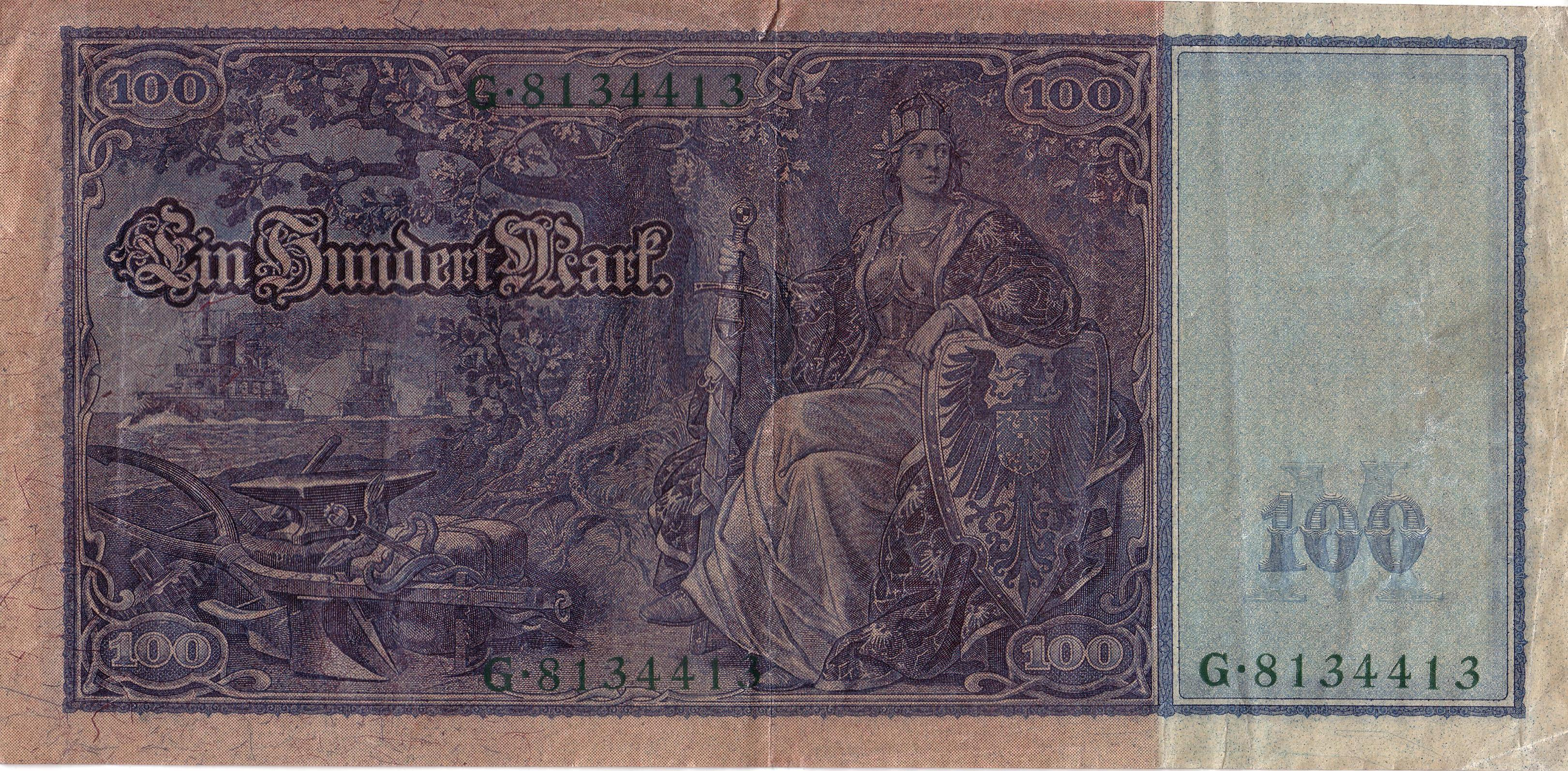 Ein Hundert Goldmark mit grünen Siegel (Nachkriegsausgabe)